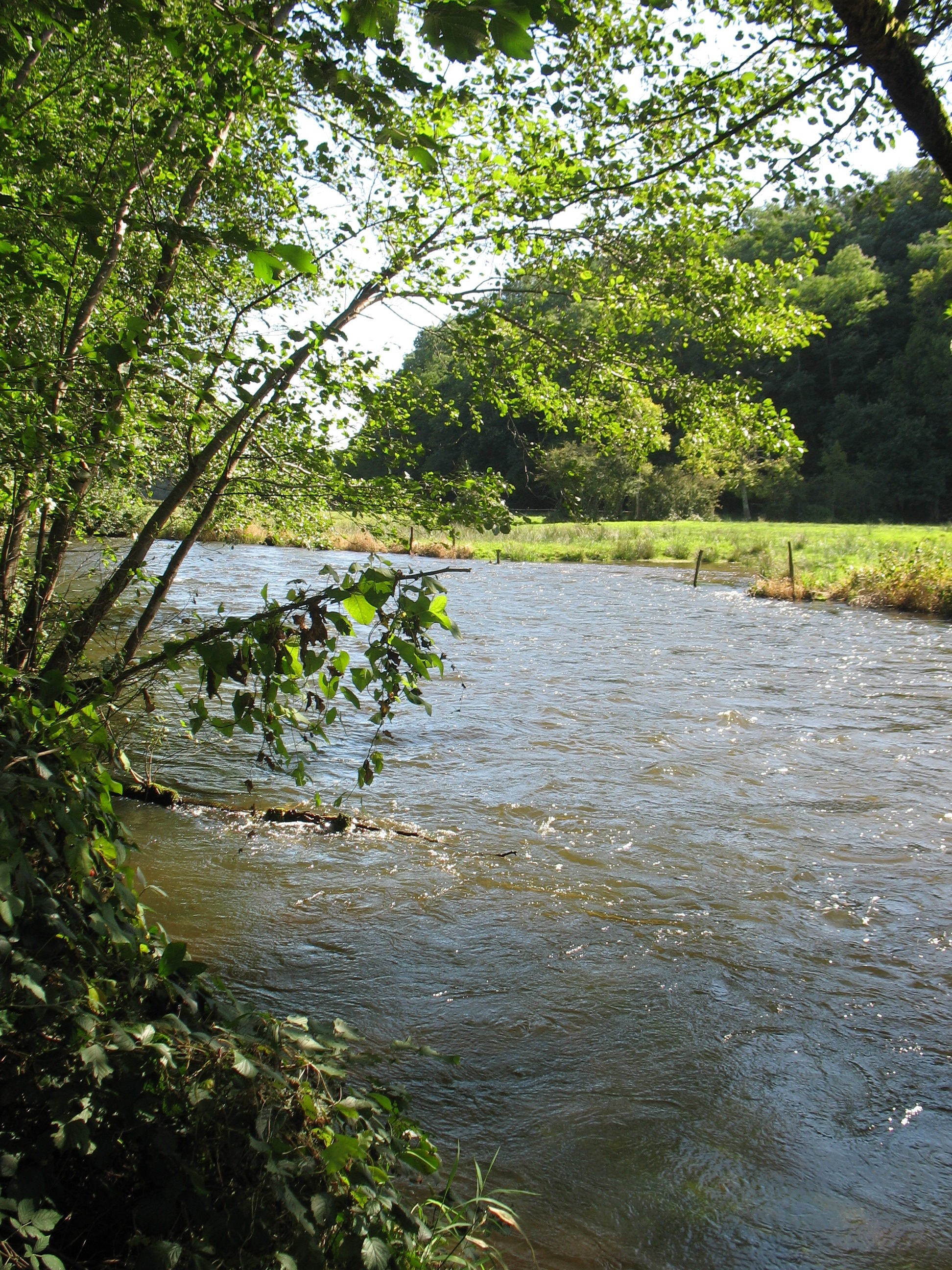 La rivière Yonne après le barrage de Pannesière-Chaumard